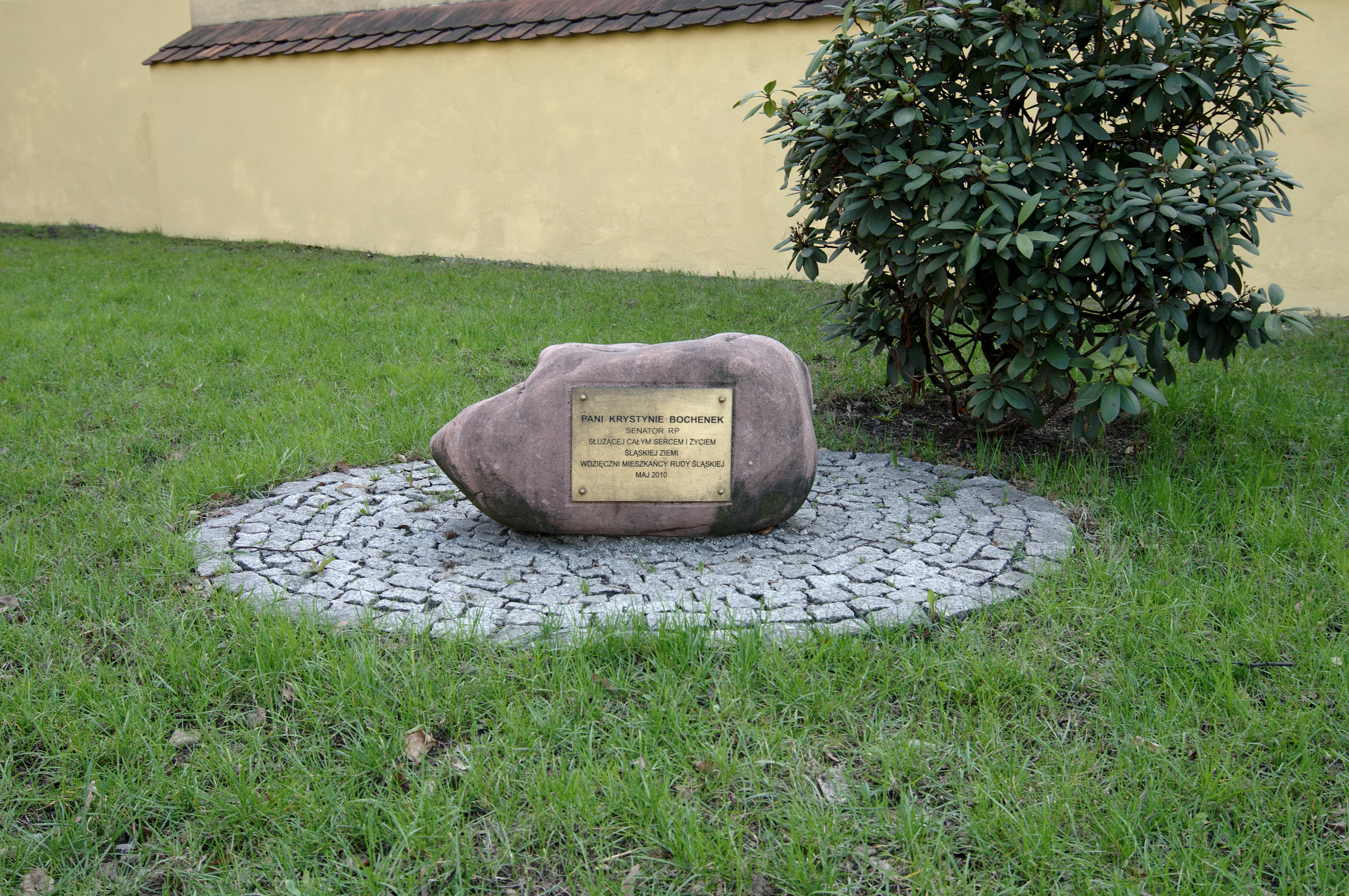 Ruda Śląska. Głaz z tablica poświęconą Krystynie Bochenek.